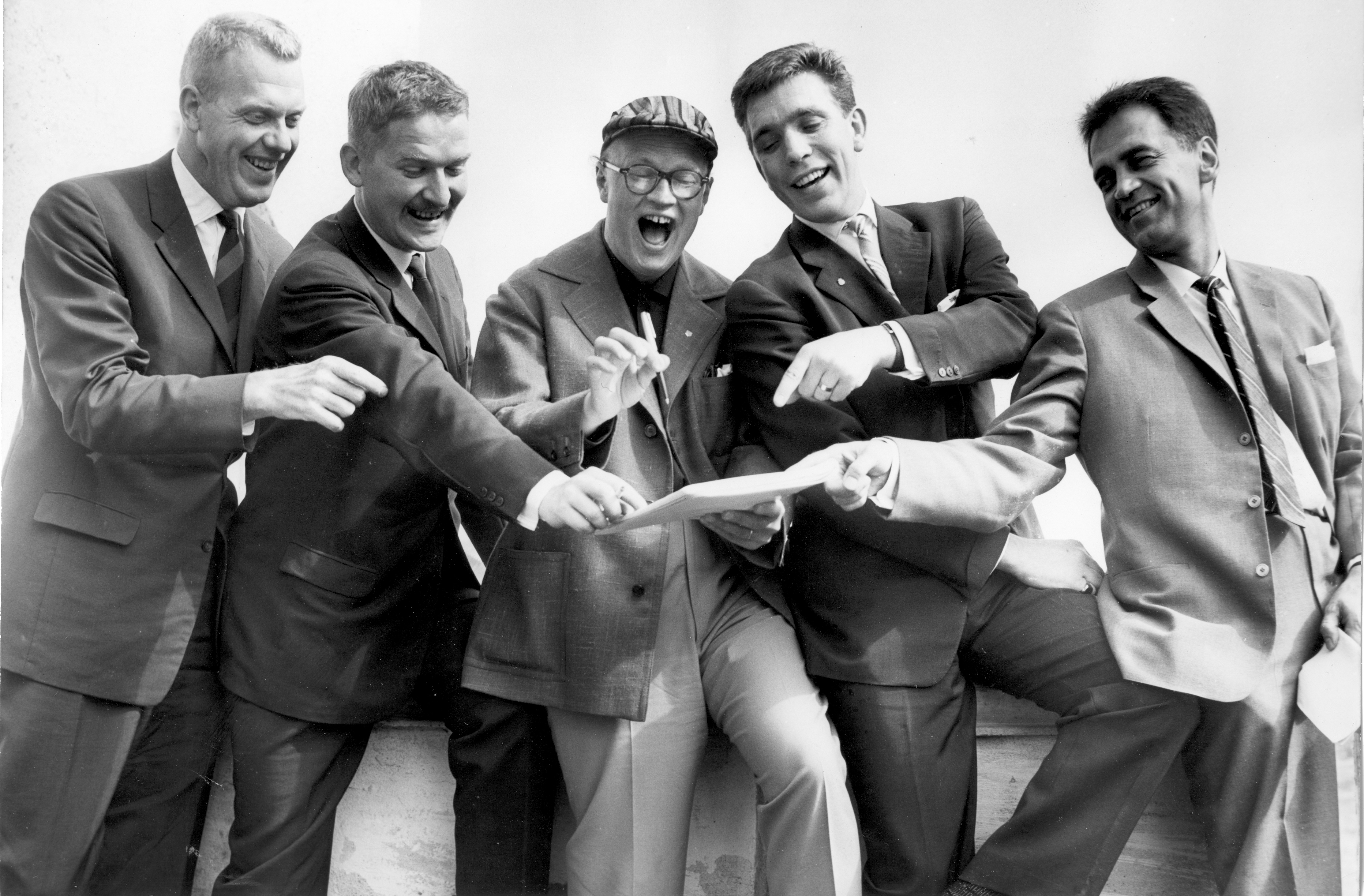 Tage Danielsson, Hans Alfredson, Povel Ramel, Owe Thörnqvist och Felix Alvo vid ett möte med pressen på Falsterbohus inför premiären på I hatt och strumpa i Stockholm 1961.